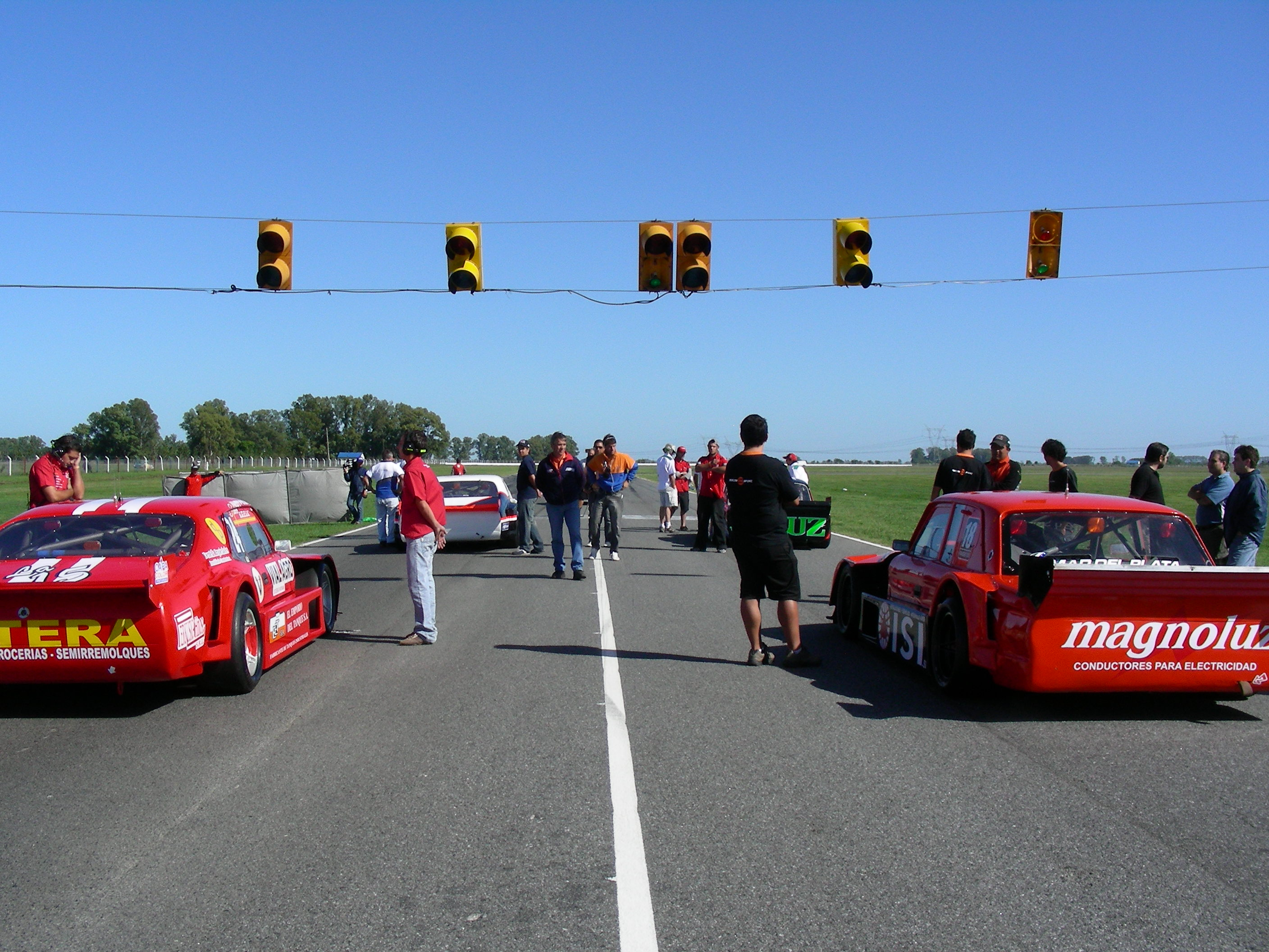 FECHA2 / Grilla de largada final del TC Mouras.